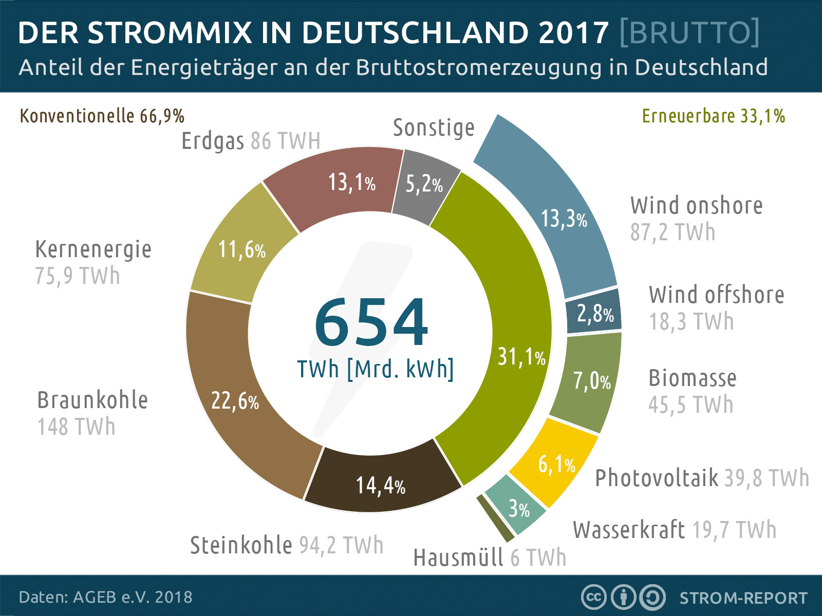 Die Daten stammen aus dem Jahresbericht 2017 der Arbeitsgemeinschaft Energiebilanzen e. V.. Die Werte für die erneuerbaren Energien sind vorläufig, da die genauen Werte erst jeweils im September bekannt gegeben werden. ( Die AGEB hat die Daten wiederum zusammengetragen aus folgenden Quellen: Statistisches Bundesamt; Bundesministerium für Wirtschaft und Technologie; Statistik der Kohlenwirtschaft e.V.; Zentrum für Sonnenenergie- und Wasserstoff-Forschung Baden-Württemberg (ZSW)